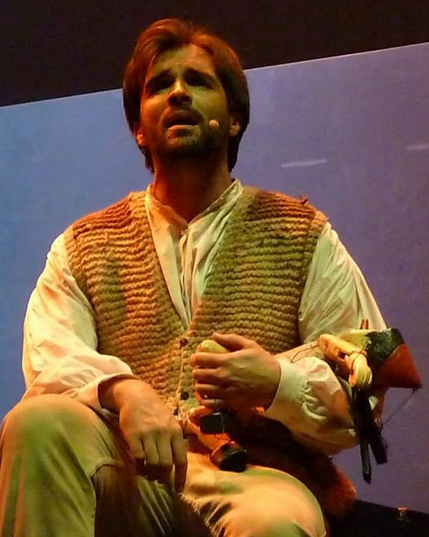 Stephane Neville dans le rôle de Gepetto dans le spectacle Pinocchio en décembre 2013